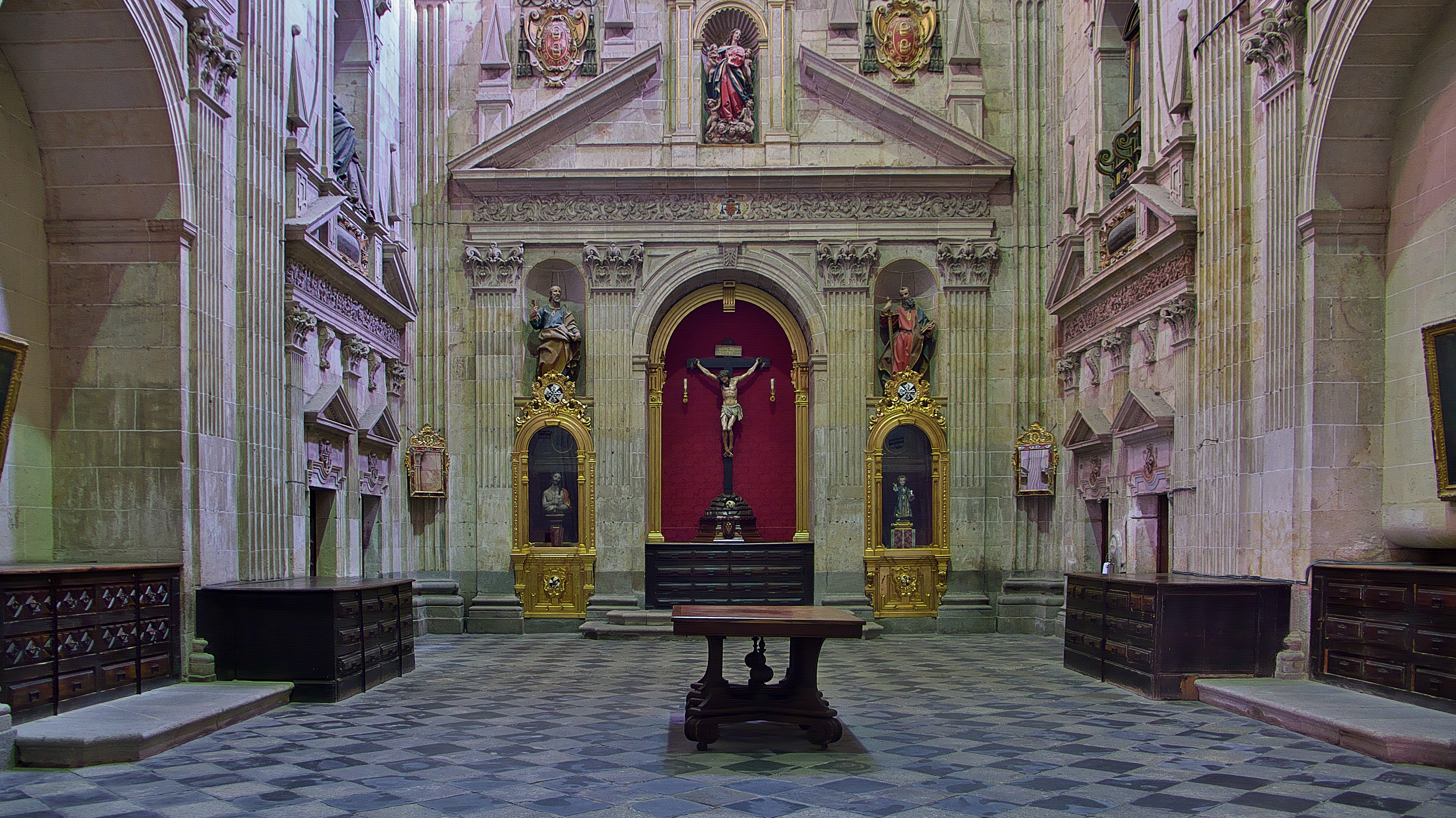 El Prior y Obispo dominico, Fr. Pedro de Herrera Suarez, patrocina esta Sacristía, siendo los artífices, Alonso Sardiña y Juan Moreno.